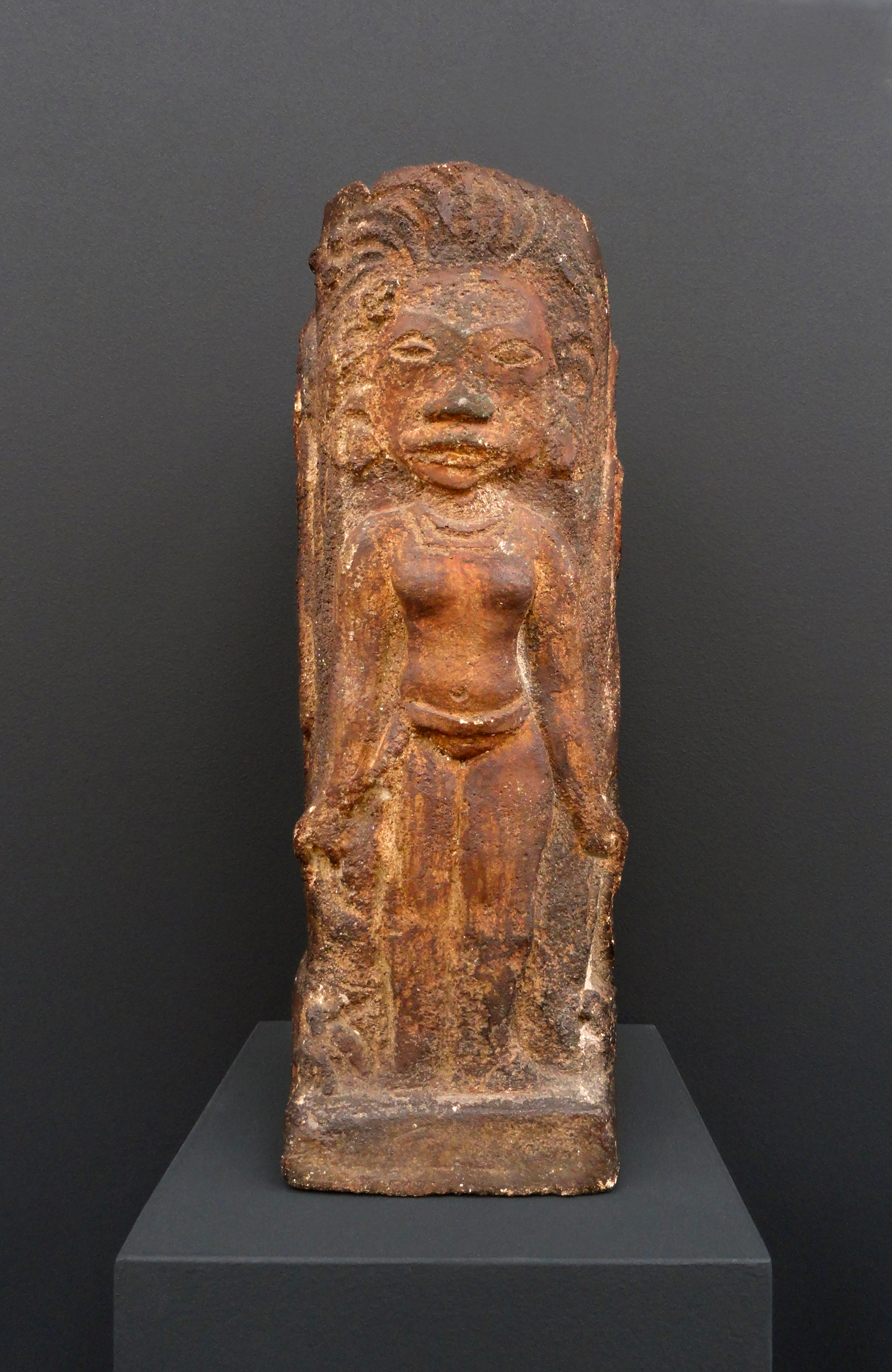 Paul Gauguin, 1893-95, Objet décoratif carré avec dieux tahitiens, terre cuite, rehauts peints, 34 cm, Musée d'Orsay, Paris.